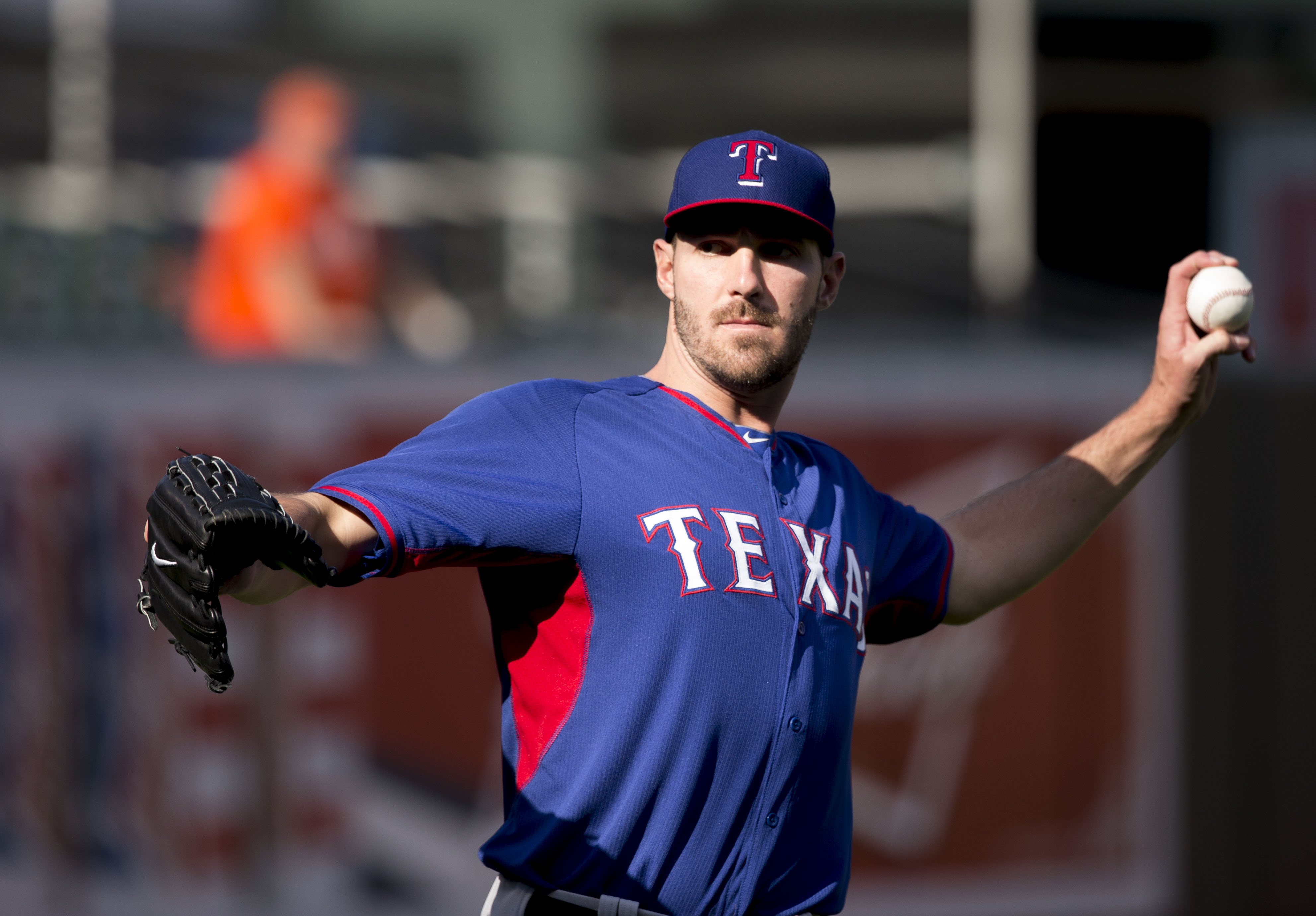 Aaron Poreda